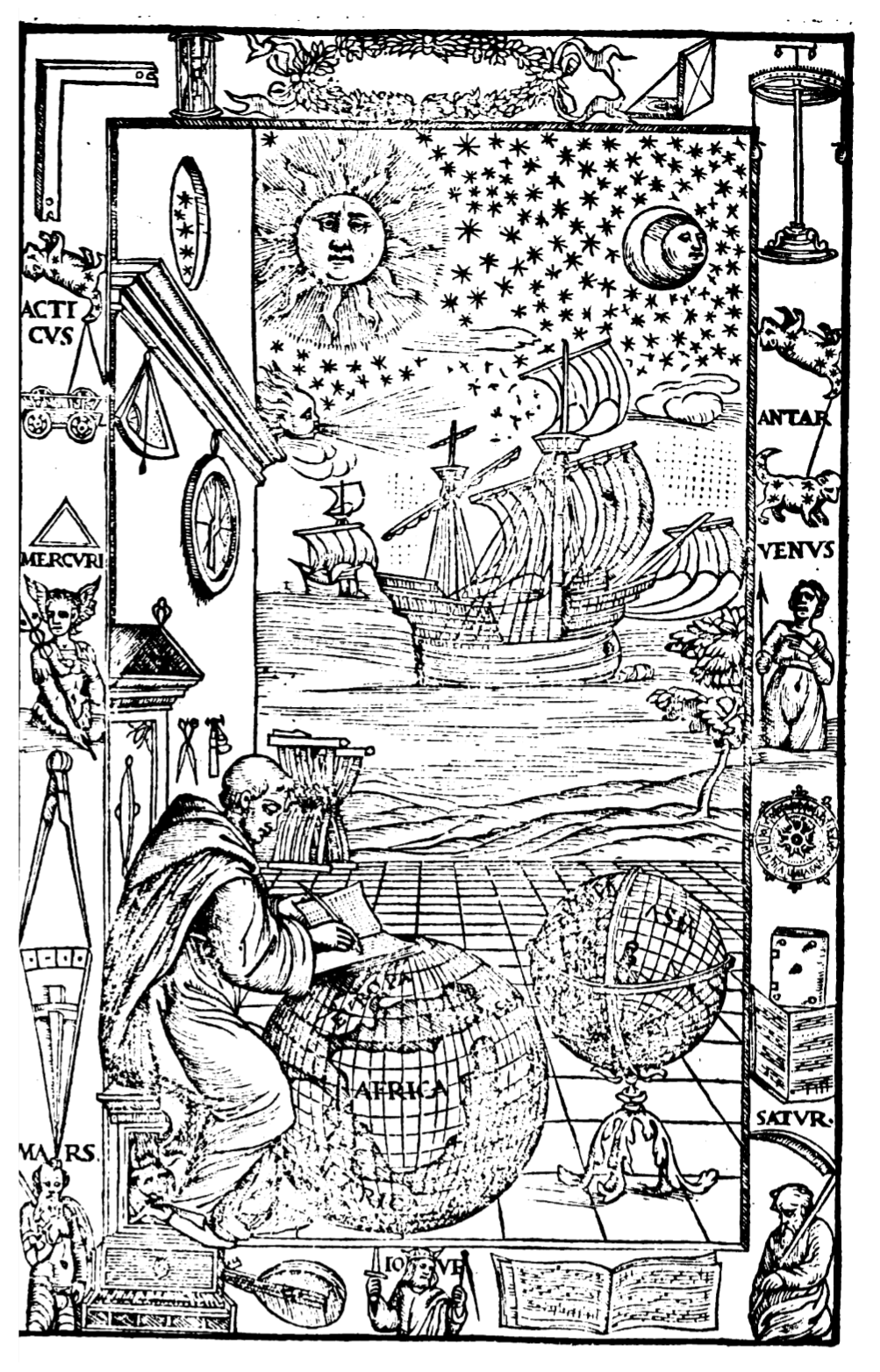 Frontespizio illustrato nella traduzione del trattato di Joannes de SacroBosco del 1230, intitolata Sphera volgare novamente tradotta; sottotitolo: con molte notande additioni di geometria, cosmographia, arte navicatoria, et stereometria, proportioni, et qvantita delli elementi, distanze, grandeze, et movimenti di tvtti li corpi celesti, cose certamente rade et maravigliose, stampato a Venezia, per Bartholomeo Zanetti, «anno salutis nostre M. D. XXXVII. mense Ottobri, &c. [Oct. 1537]»